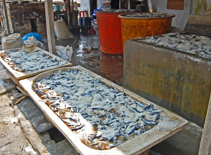 Fish being salted, Muara Angke, Jakarta, Indonesia